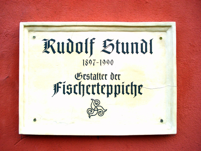 Gedenktafel zu Ehren von Rudolf Stundl in der Gützkower Straße 84, Greifswald